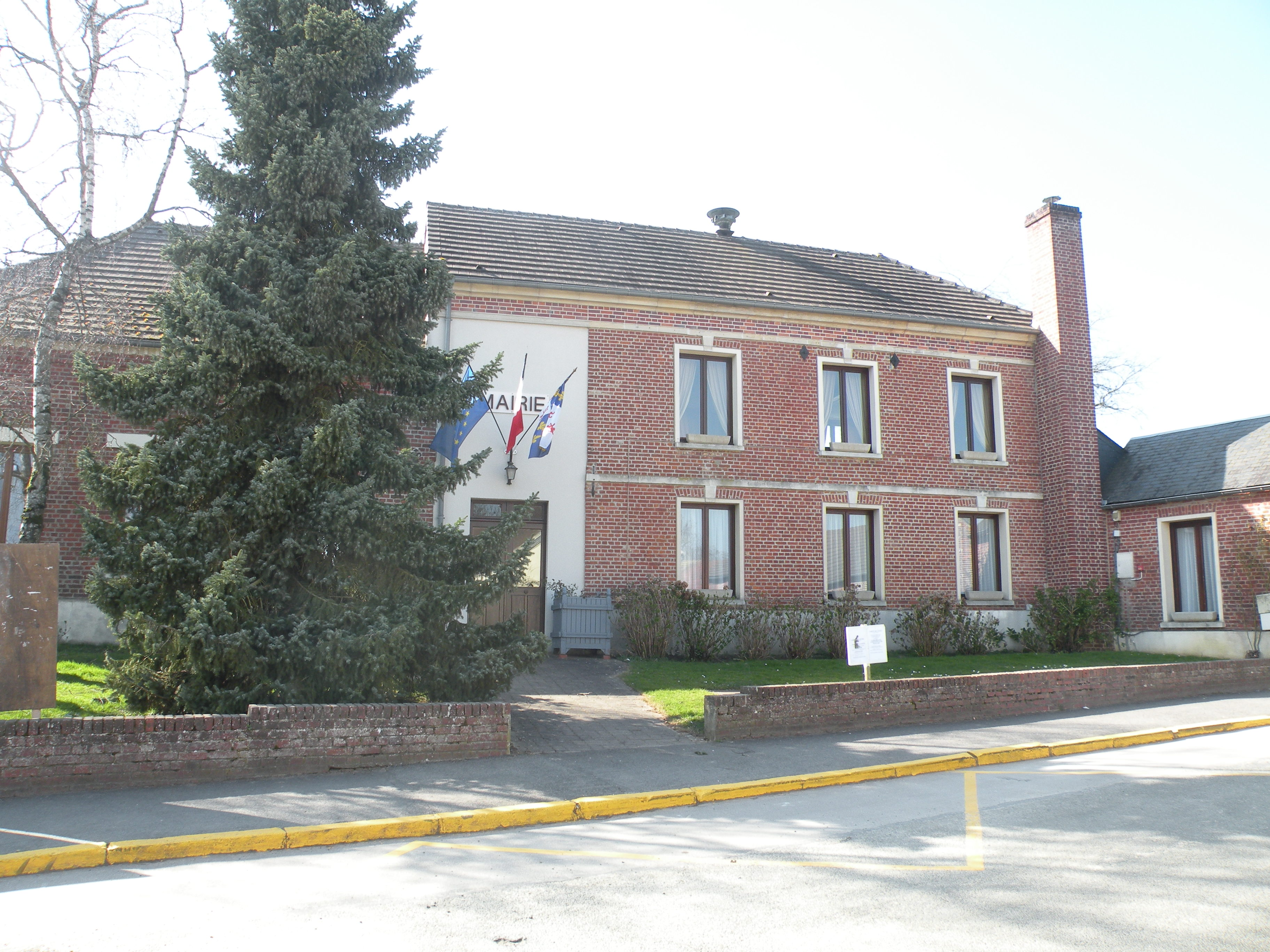 Le Mesnil-Théribus mairie